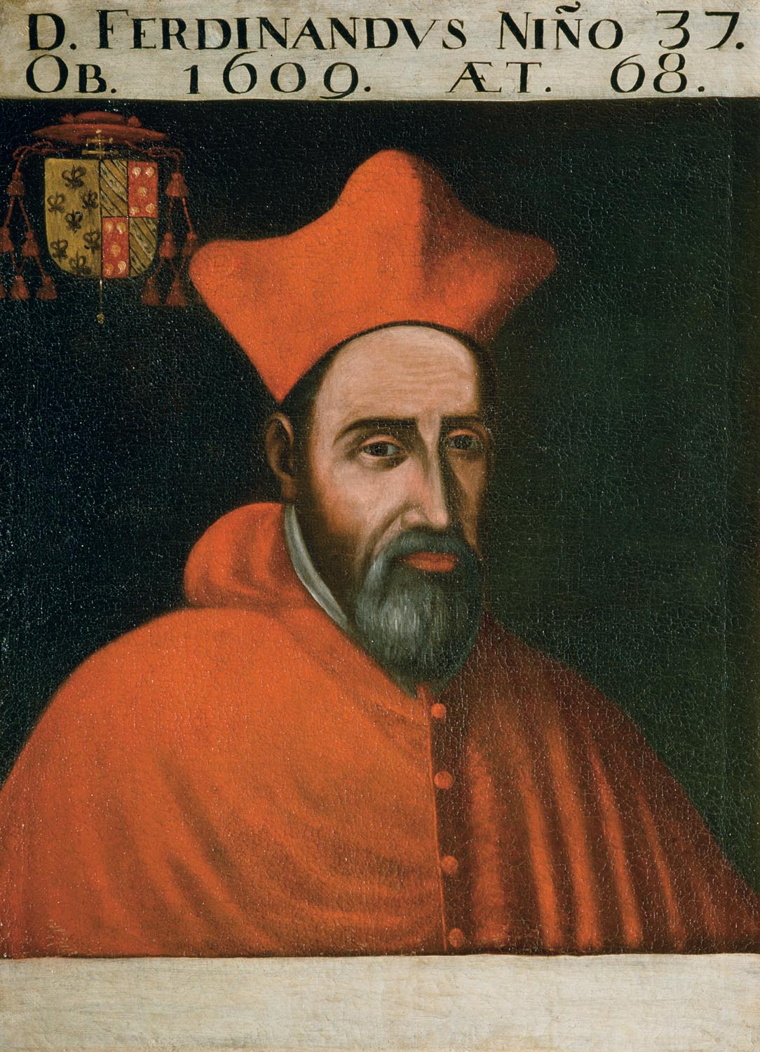 Retrato del cardenal Fernando Niño de Guevara (1541-1609), que llegó a ser arzobispo de Sevilla e Inquisidor general de España. Es una obra anónima de 79 x 58 cm. conservada en el Arzobispado de Sevilla.